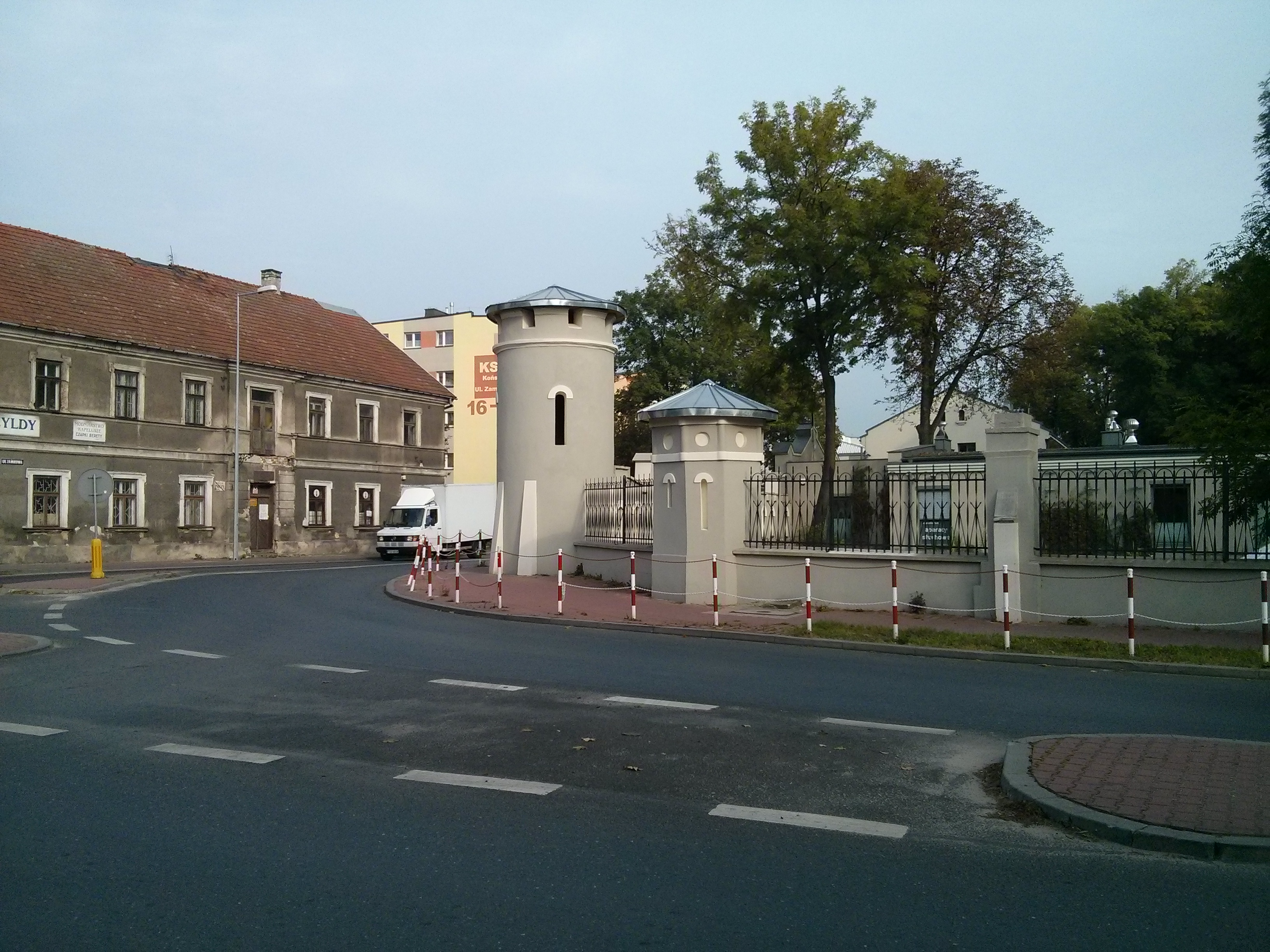 Końskie, baszta II, 1840 r., Baszta II to ta mniejsza